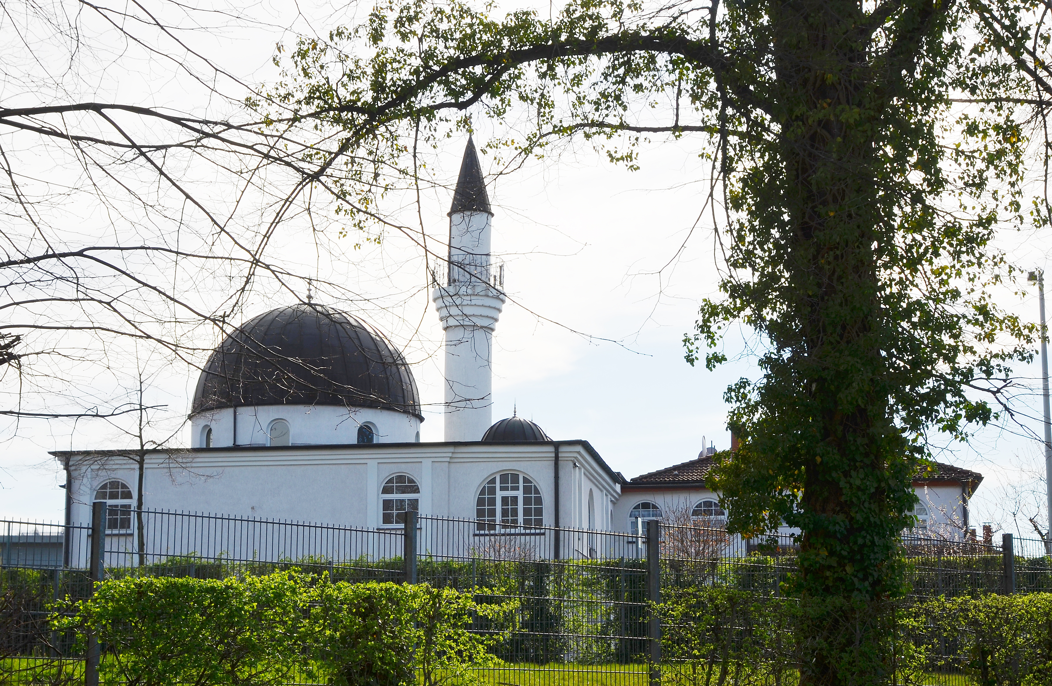 Werl, Kurfürstenring, Moschee